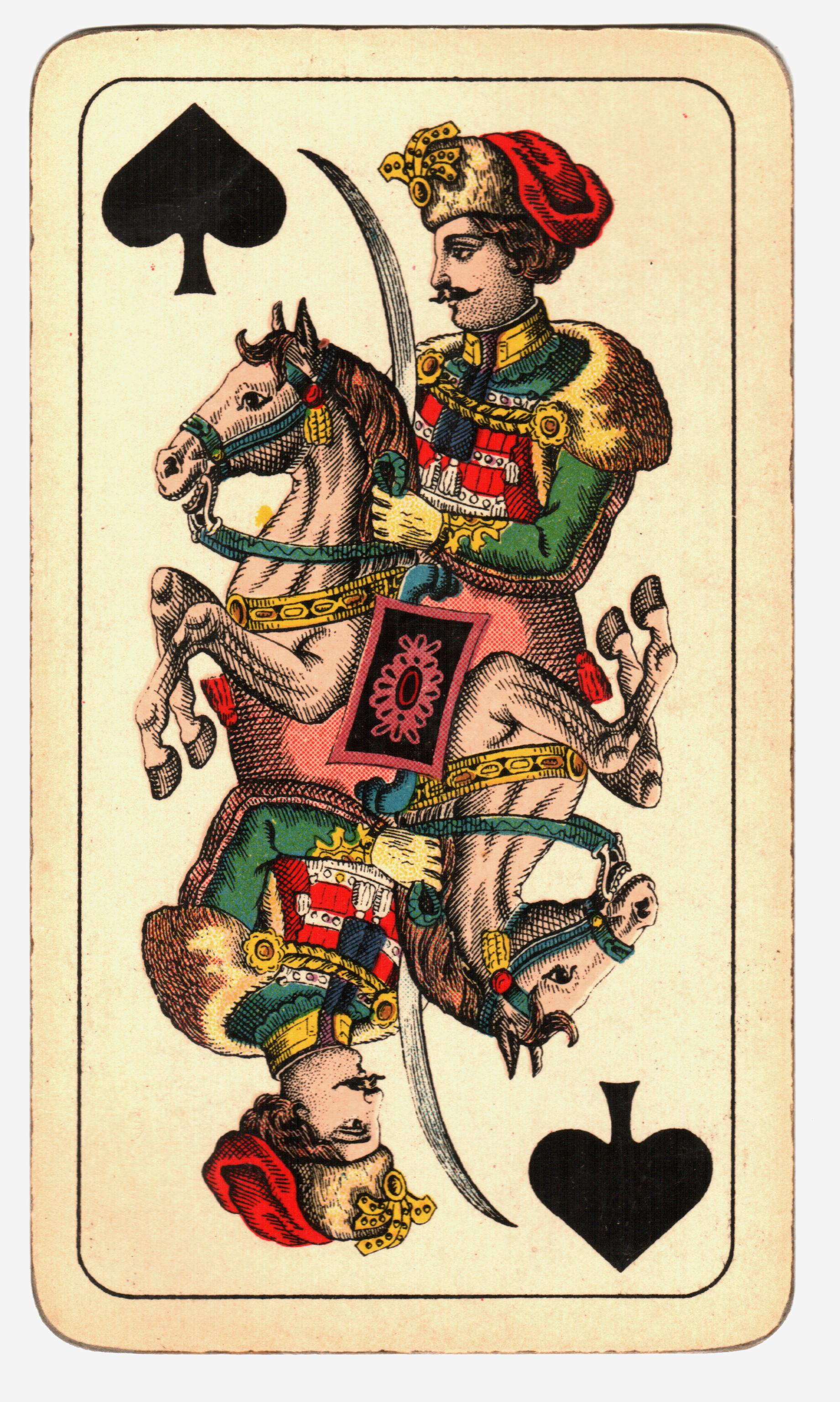 A felvételek 2013. Január 18 –án készültek. Kártya. Gyártotta Hamburger és Birkholz R.T. Budapest VI. Forgács u. 9a Mérete: 7 cm x 12,2 cm. A magyar Tell kártya története: A magyar Tell kártya az 1848 –as forradalmat megelőző időben jelent meg. Schneider József pesti kártyafestő az alsó és felső alakjait Schiller 1804 –ben írt, Tell Vilmos című drámájából vette, melyet a Magyar Királyságban, Kolozsváron már 1827 –ben előadtak. A magyar Tell kártya legrégibb ismert példányát Schneider József kb. 1835 –ben készítette. (9,4 cm x 5,6 cm). Schneider a 36 lapos kártyát rézbe metszette. A piros, skarlátvörös, kék és barna szineket sablonnal vitte a lapokra. Az arcot, a kezet és a ruházat apró díszeit kézzel festette. Az 1848 –49 –es szabadságharc leverését követően az osztrák kormányzat elkobozta a kártyákat. A Piatnik cég 1865 körül kezdte gyártani a magyar Tell kártyát. Források: Zsoldos Benő: A játékkártya és története Gondolat, Budapest 1980 ISBN 963 280 885 1 ©© Published under Creative Commons in the Metapolisz DVD line. All of the photos and vids in the Metapolisz DVD line are under Creative Commons and can be used even for commercial – for profit – purposes. Recommended Citation Derzsi Elekes Andor: Metapolisz DVD line ©© Megjelent Creative Commons alatt a Metapolisz sorozatban. A Metapolisz sorozat valamennyi képe és filmje Creative Commons alatti valamint kereskedelmi - for profit - célra is felhasználható. Ajánlott hivatkozás: Derzsi Elekes Andor: Metapolisz DVD line